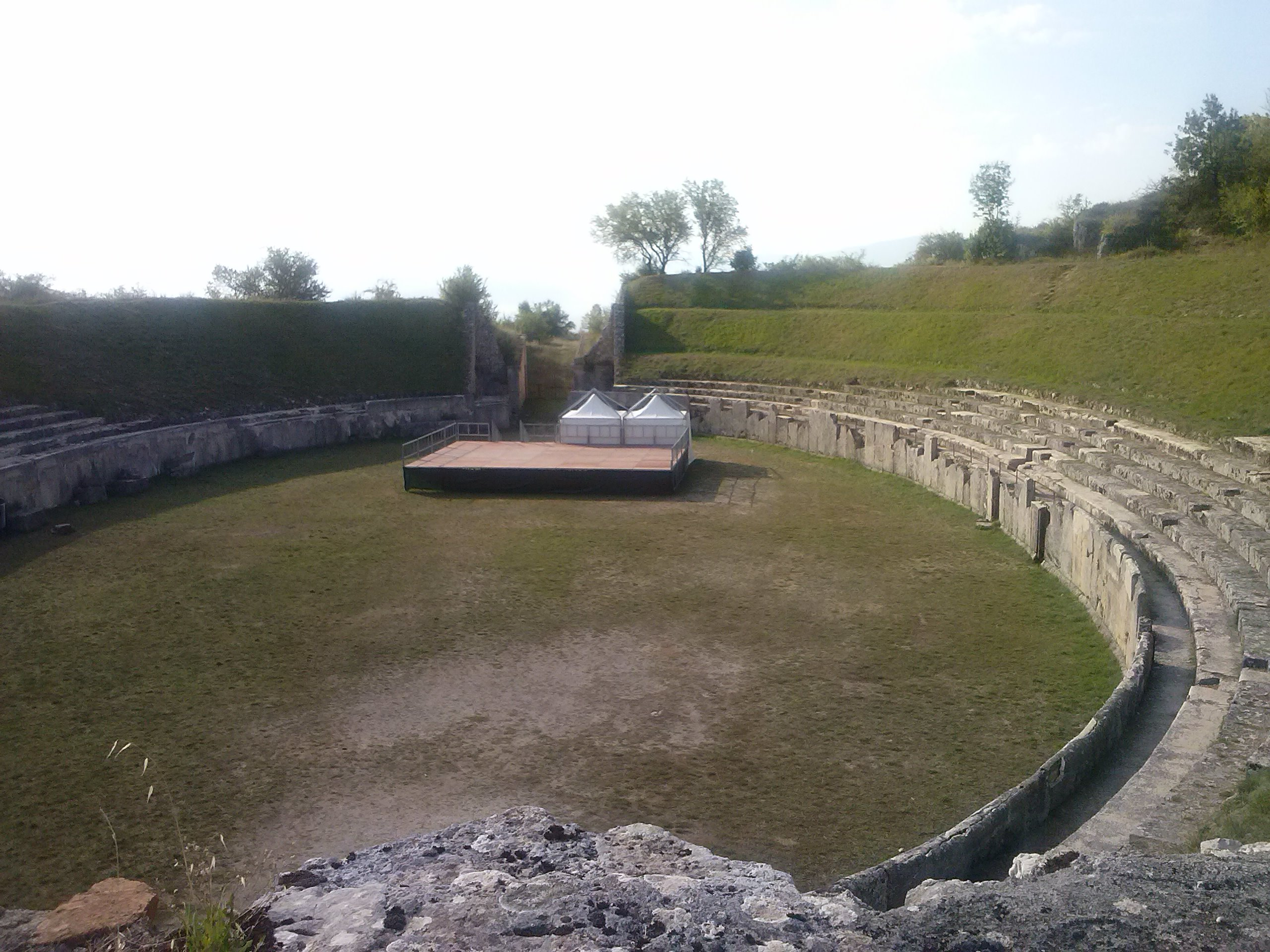 Anfiteatro di Alba Fucens